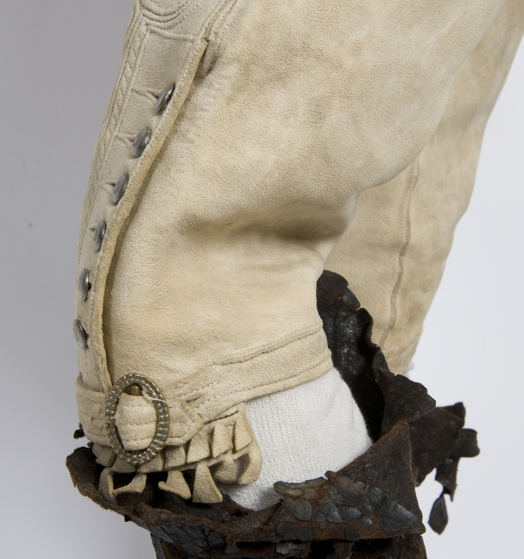 Skinnbukse fra Numedal i Buskerud med støpt knespenne i messing. Bredde 3 cm. Foto Anne-Lise reinsfelt / Norsk Folkemuseum, NF.1925-0068AB.